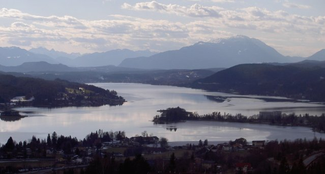 Wörthersee vom Pirker Kogel aus gesehen - Lake Wörth (view in Western direction, as seen from the Pirkerkogel) 23:35, 1. Jul 2004 Ghoelzl 639 x 342 (38.646 Byte) (Woerthersee)